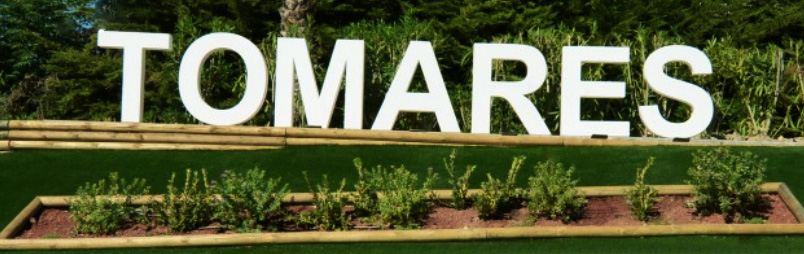 Letrero de entrada al municipio de Tomares (Sevilla) con cada letra del nombre del municipio. Se ubica en la Av. de la Arboleda.